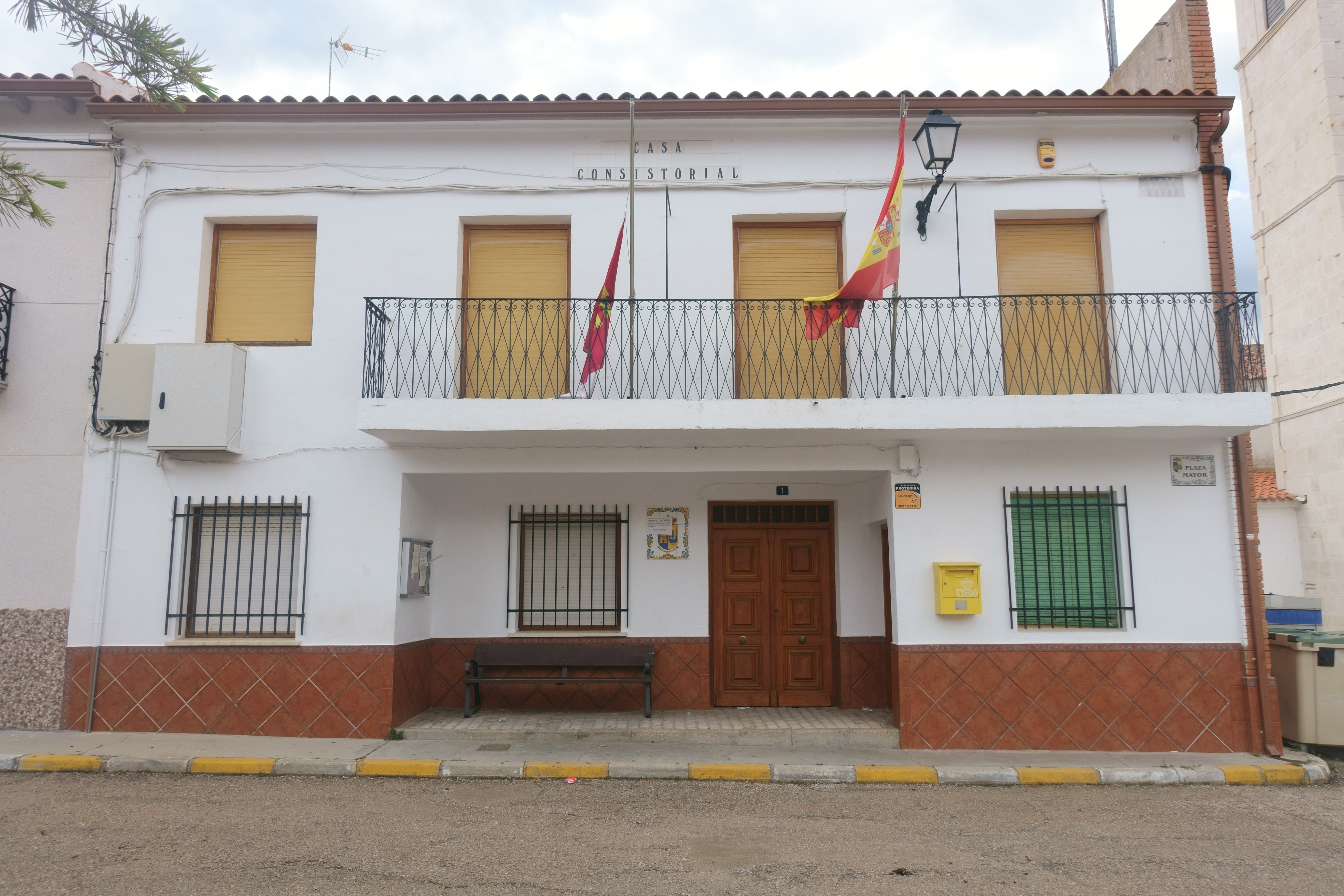 Casa consistorial de Fuentelespino de Haro (Cuenca, España).